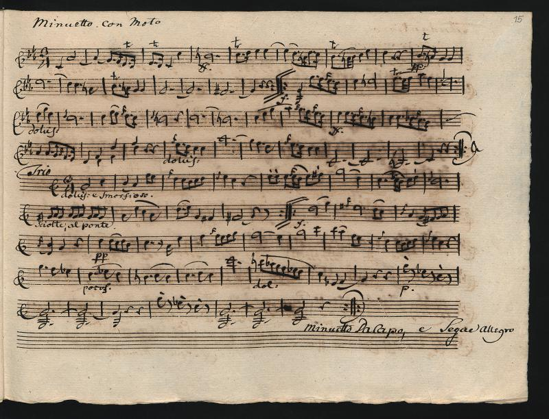 Manuscrit du quatuor opus 32 n.5 de Boccherini (menuet)